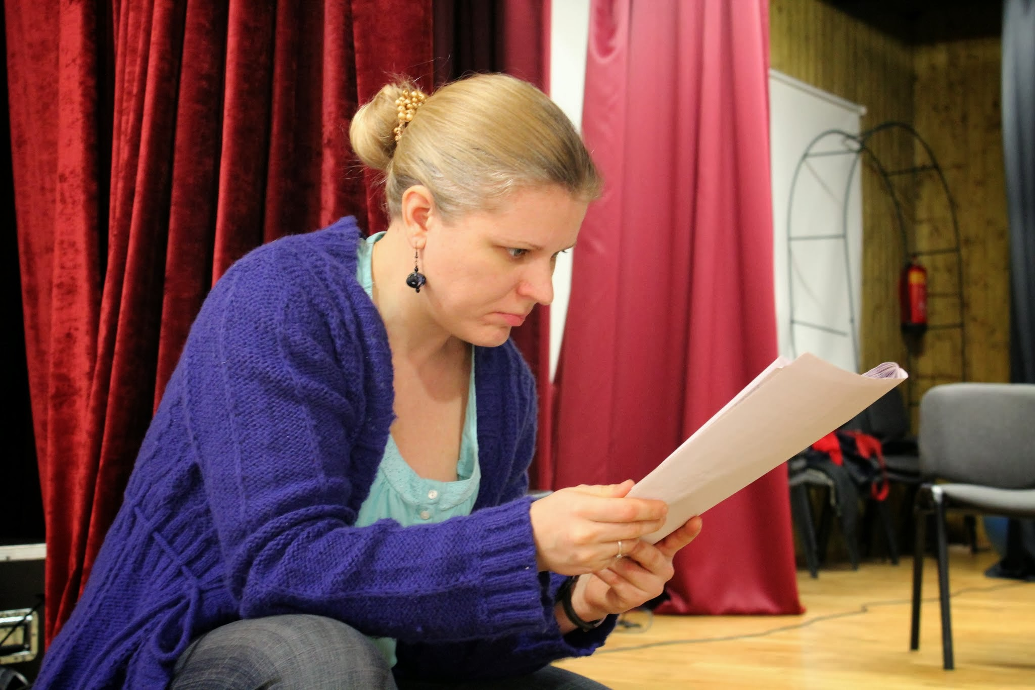 Ingrid Ulst